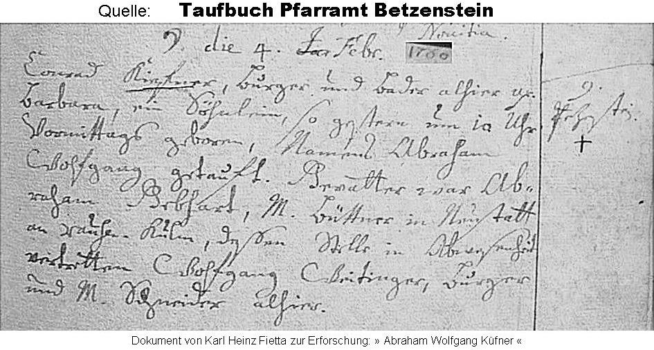 Taufbucheintrag des Pfarramts Betzenstein von 1760: 4. Februar Conrad Küfner, Bürger und Bader alhier Barbara, ein Söhnlein, so gestern um 10 Uhr vormittags geboren, Namens Abraham Wolfgang getauft. Gevatter war Ab raham Gebhart, M. Büttner in Neustatt am rauen Kulm, dessen Stelle in Abwesenheit vertretten Wolfgang Weitinger, Bürger und M. Schneider alhier. Anmerkung: Gevatter = Taufpate Aus dem Text ergibt sich das Geburtsdatum von Abraham Wolfgang Küfner: 3. Februar 1760, geboren in Betzenstein.